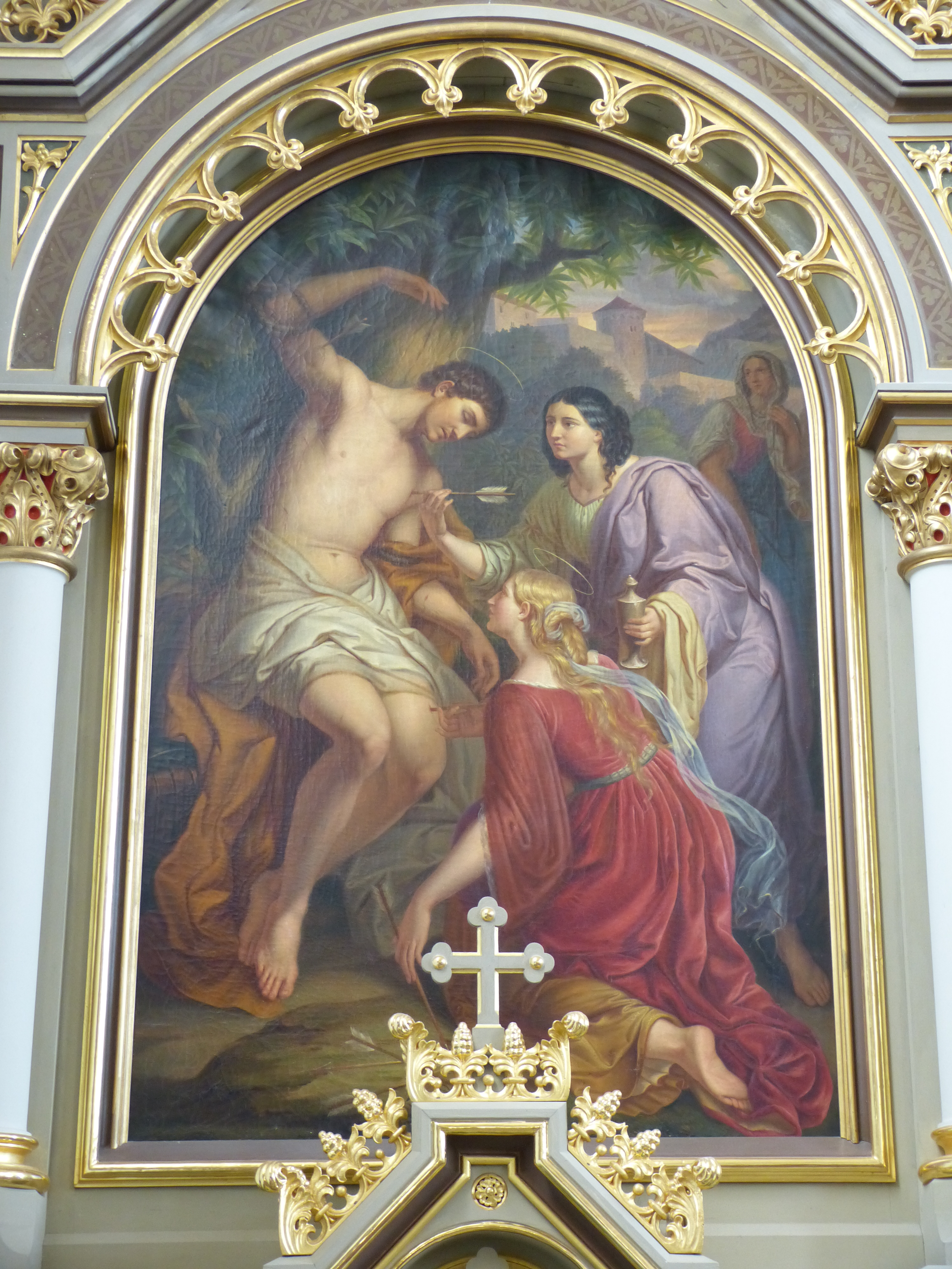 Mariä Himmelfahrt, Markt Wald, Landkreis Unterallgäu, Bayern, Deutschland